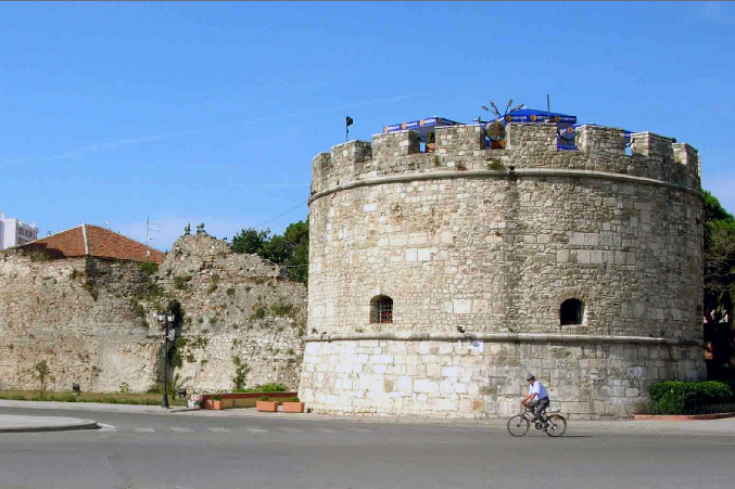 Durrës